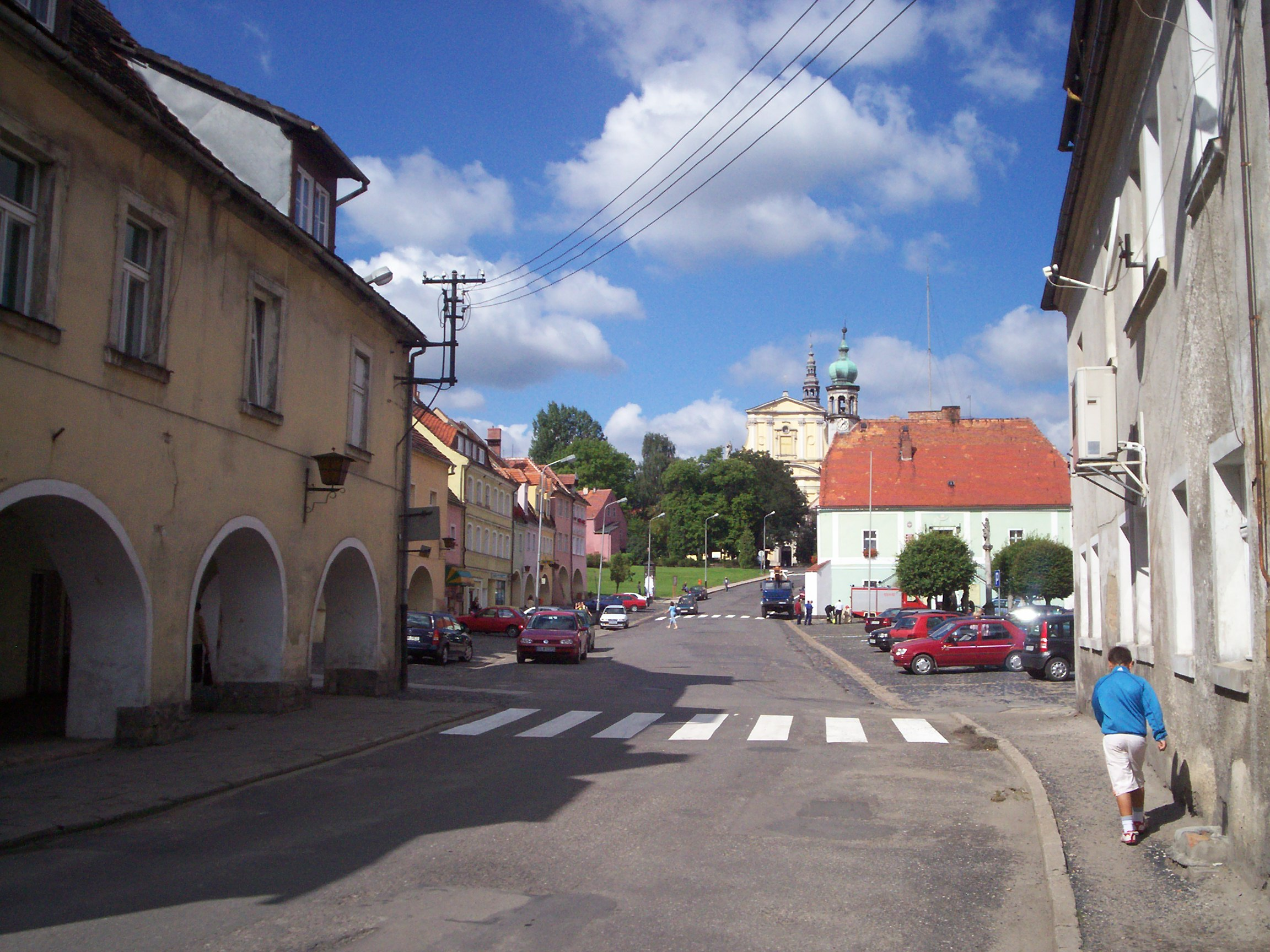 Lubomierz, rynek.